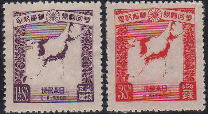 1930年10月に行われた日本の第二回国勢調査記念切手。描かれているのは当時の日本の版図を示す地図である。